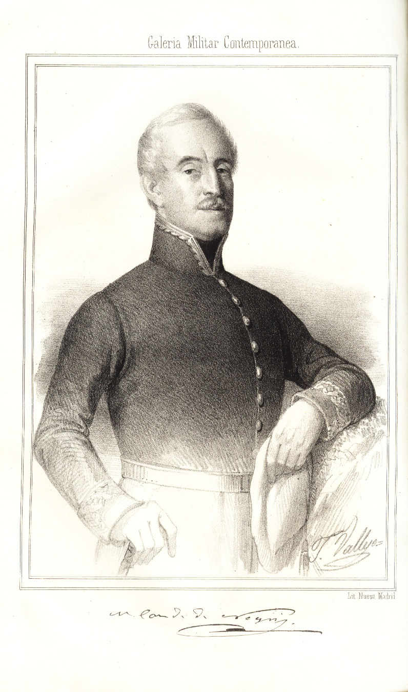 Ignacio Negri y Mendizábal.